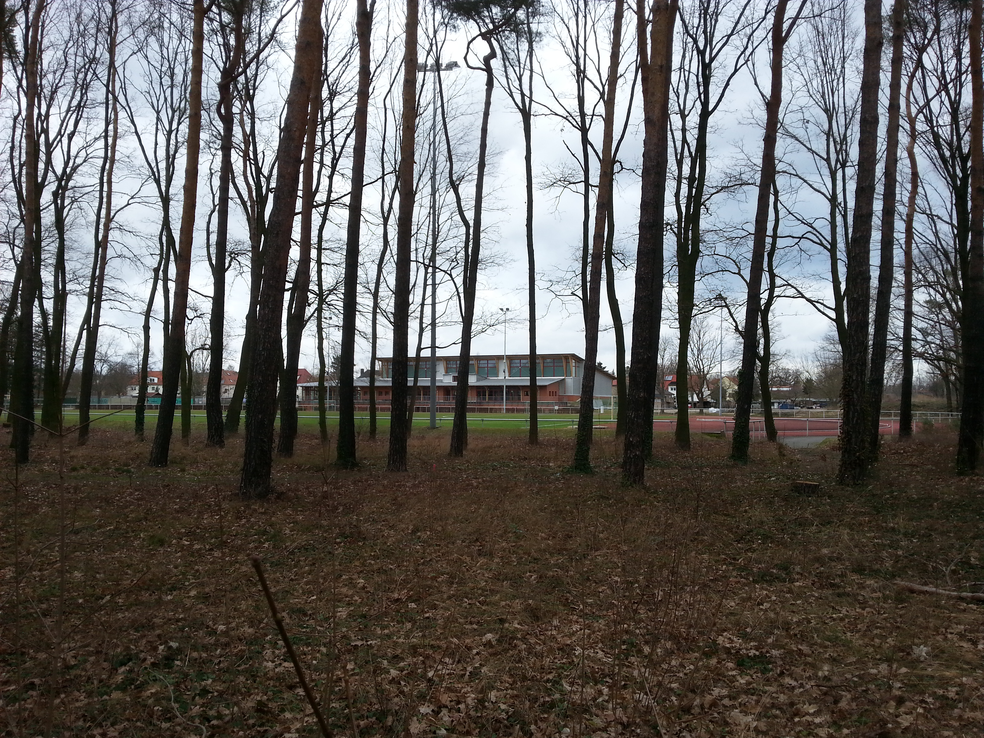 Die Paul-Dinter-Halle in Königs Wusterhausen, von der Fichtestraße aus gesehen.